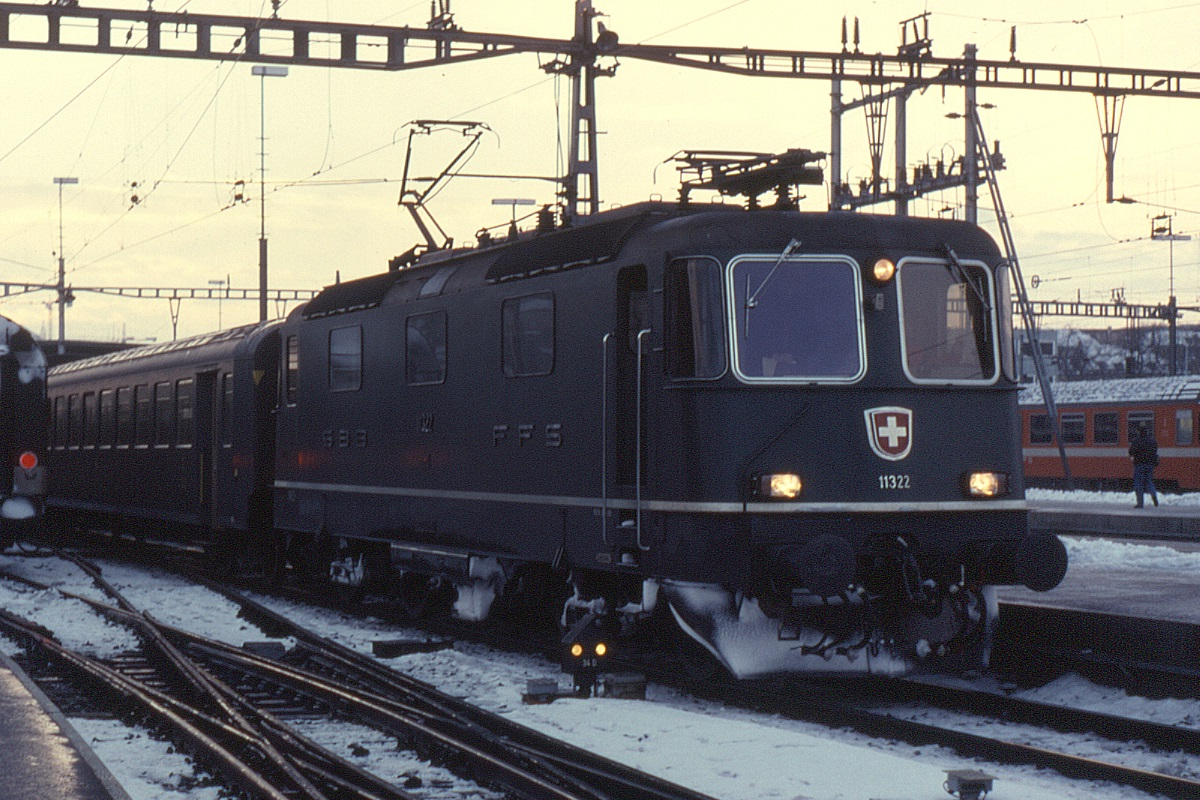 Re 4/4 II 11322 mit einem abfahrbereiten Zug in Zürich HB